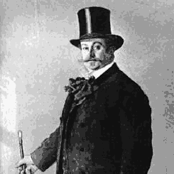 Alexander Kielland malt av Eilif Peterssen (1852–1928) i 1893. Se [1]